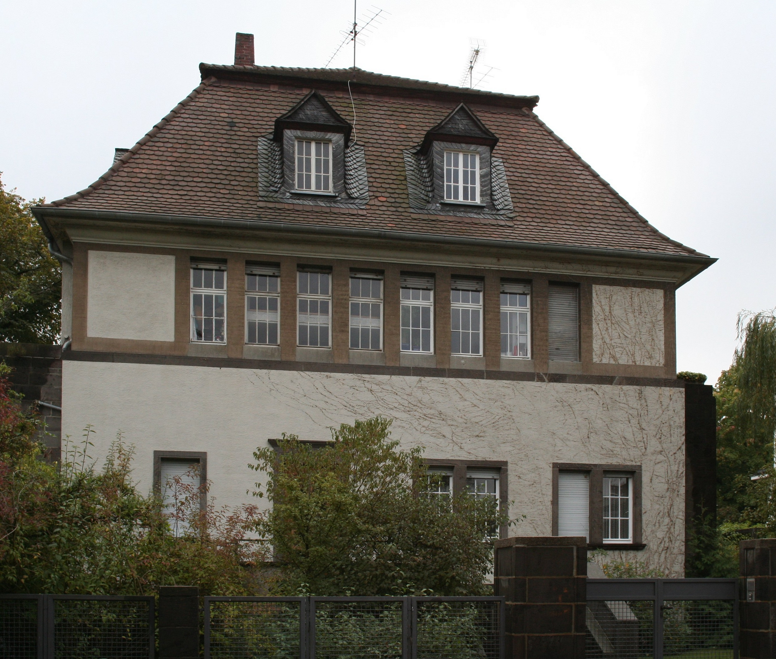 Oberhessisches Haus auf der Mathildenhöhe, Darmstadt (Germany)